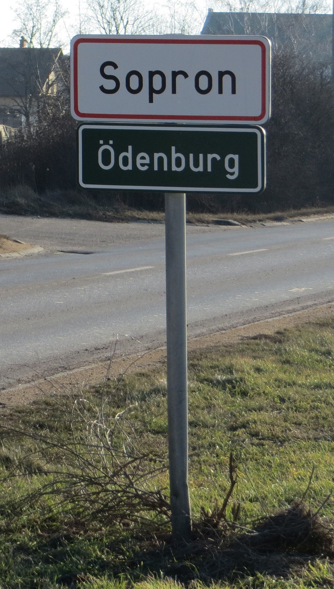 zweisprachige Ortstafel Ödenburg